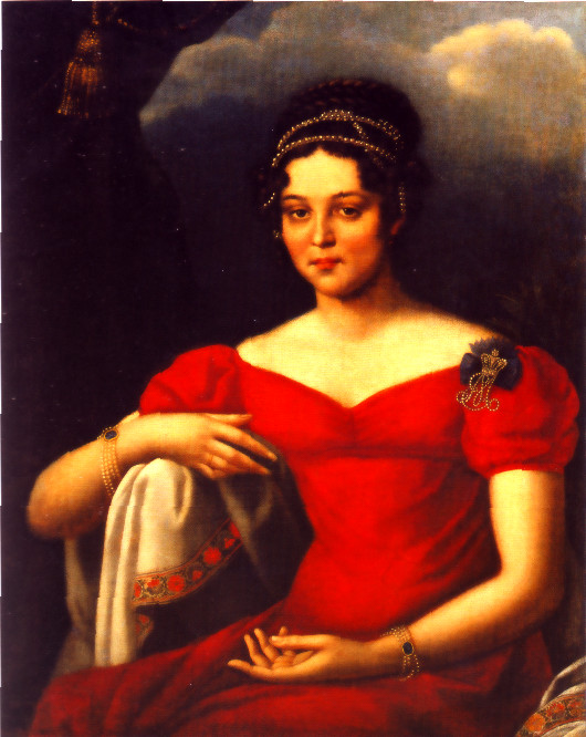 Портрет А.Ф. Закревской